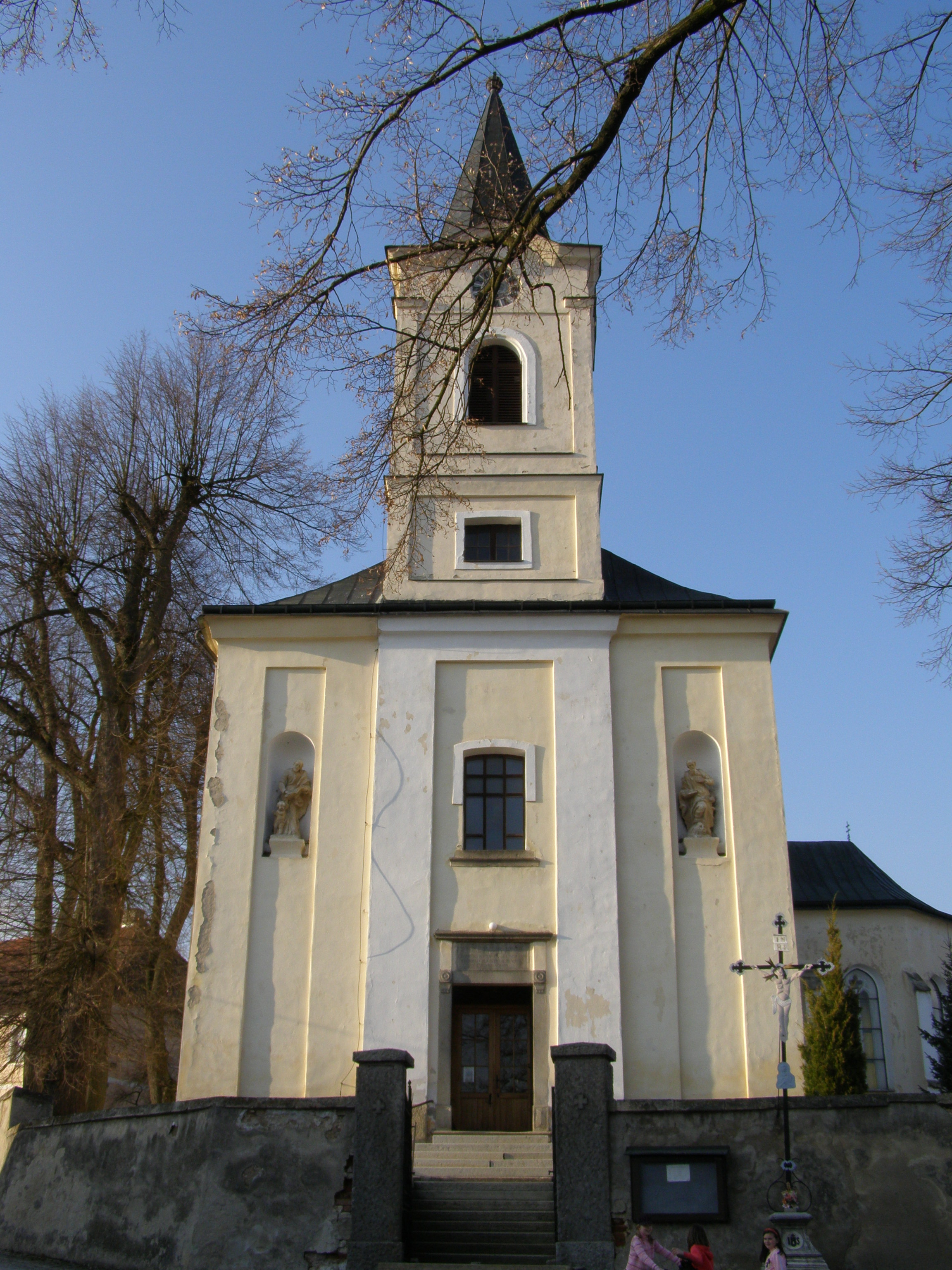 Mrákotín, Kostel svatého Jiljí